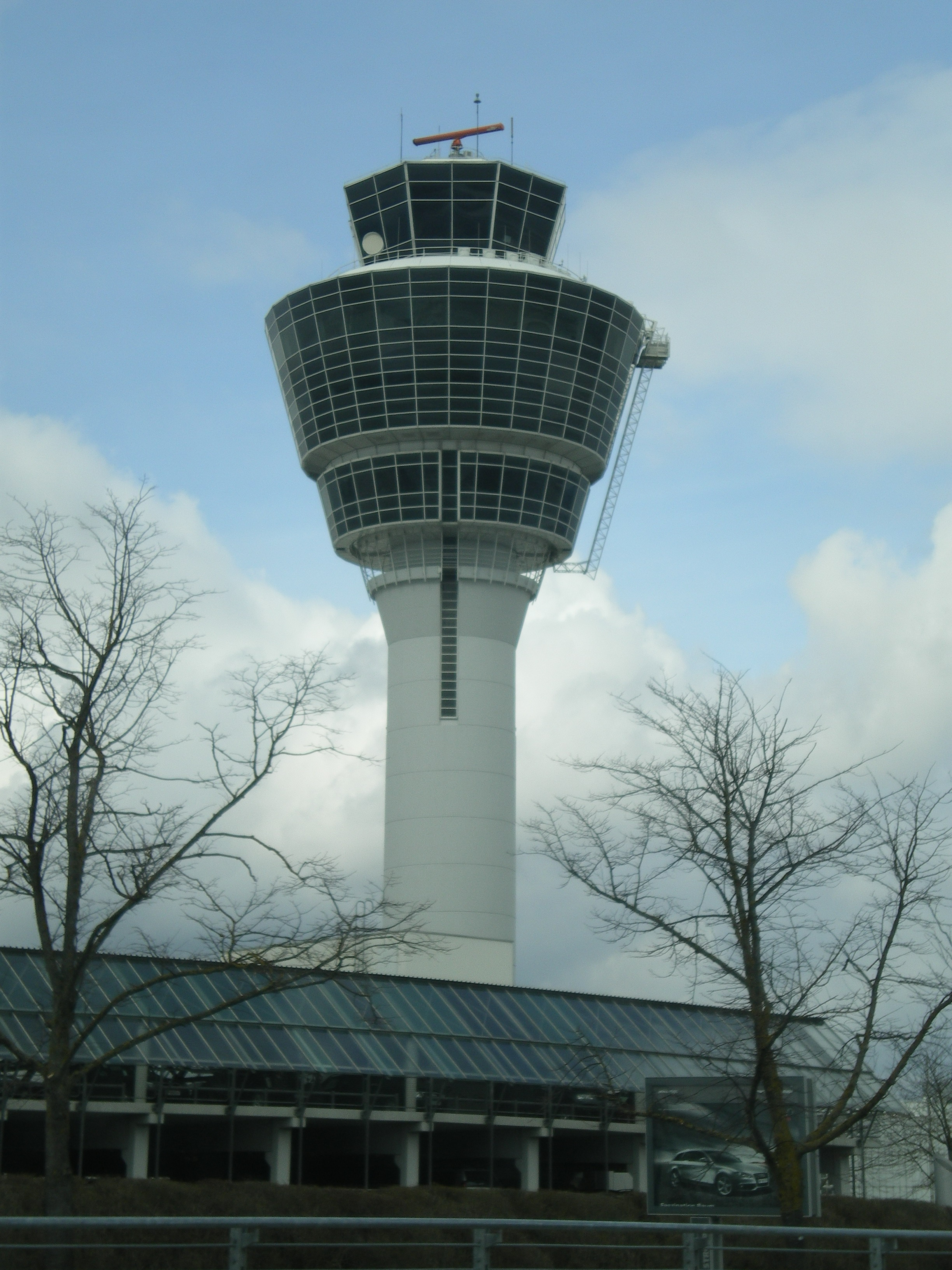 Tower MUC